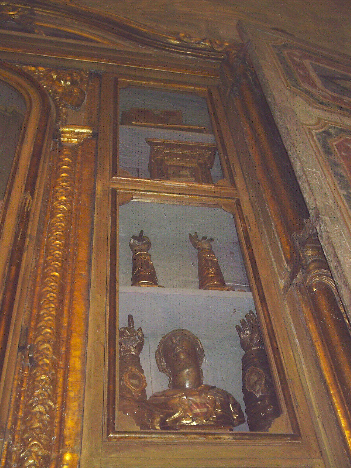 Particolare del reliquiario della Chiesa della Madonna della Valle